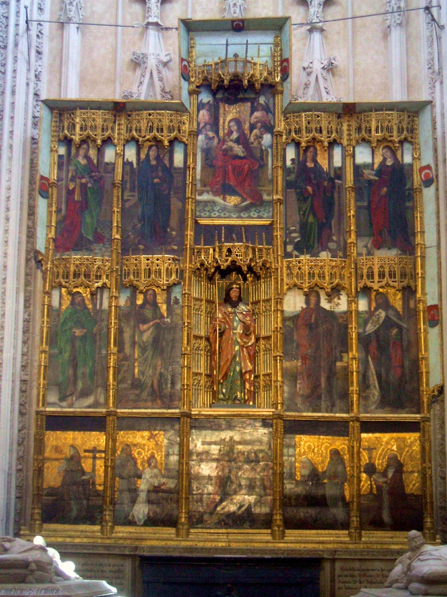 Retablo gótico en la Catedral de Toledo